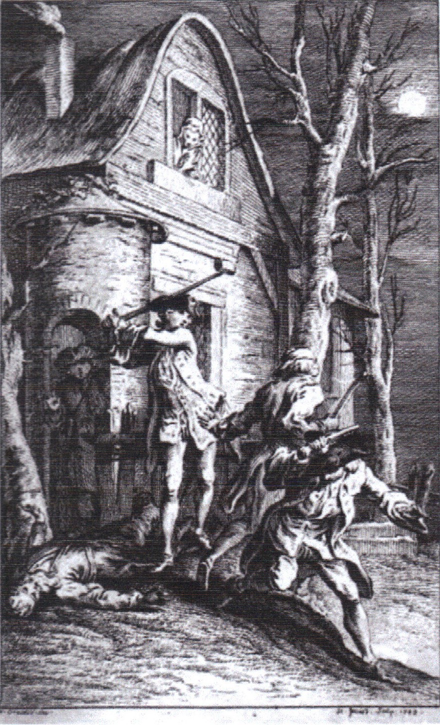 Première traduction de Tom Jones en français, tome II. Estampe de Gravelot illustrant le texte de la page 62 :« Notre héros ne leur fit aucune question, mais il travailla si vivement sur eux avec son redoutable cimeterre que les voleurs [...] n'eurent rien de plus pressé que de lâcher prise. » (Tom secourt le vieil homme de la colline).